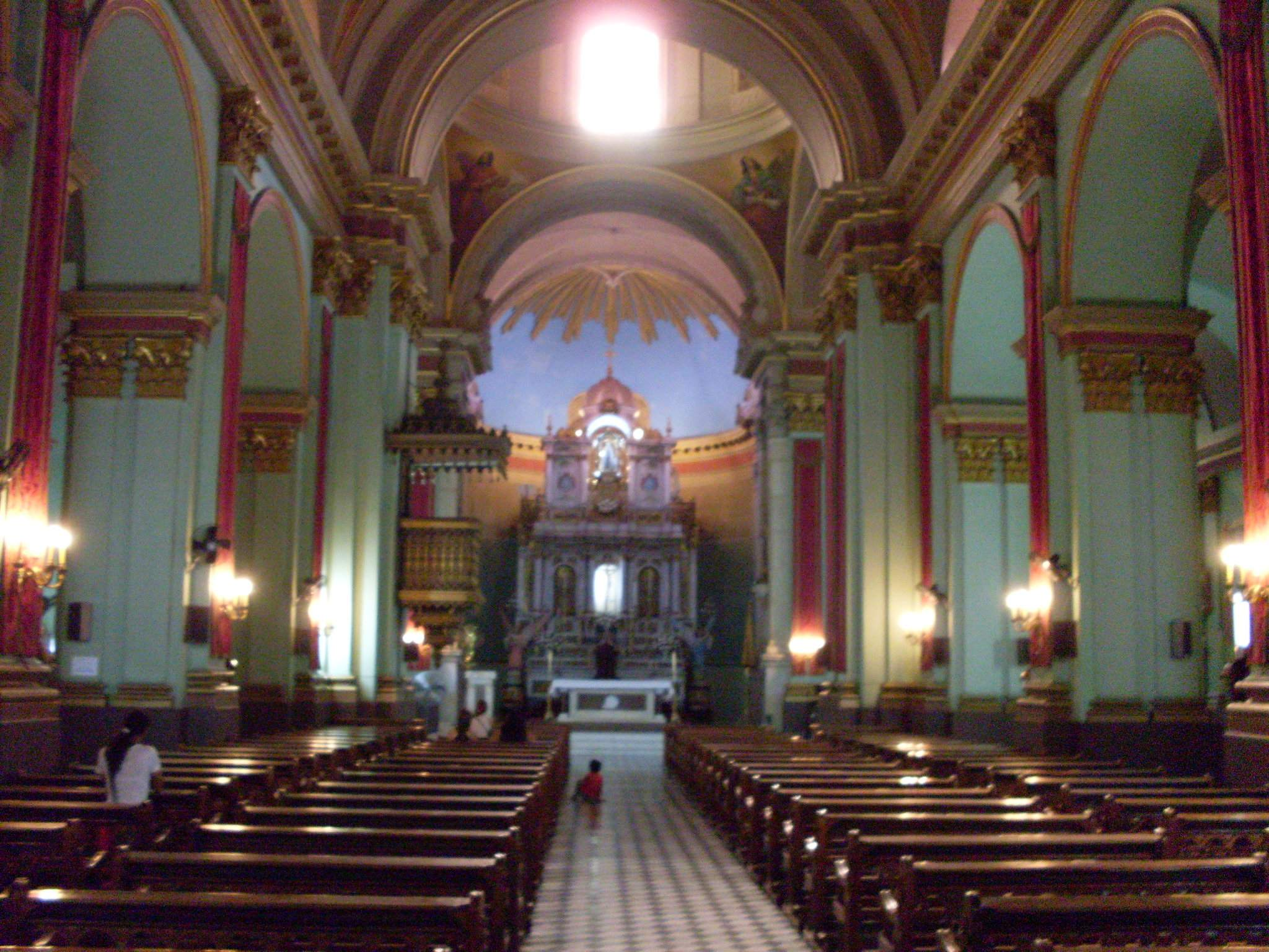 Catedral Basílica Nuestra Señora del Valle, San Fernando del Valle de Catamarca, Argentina.